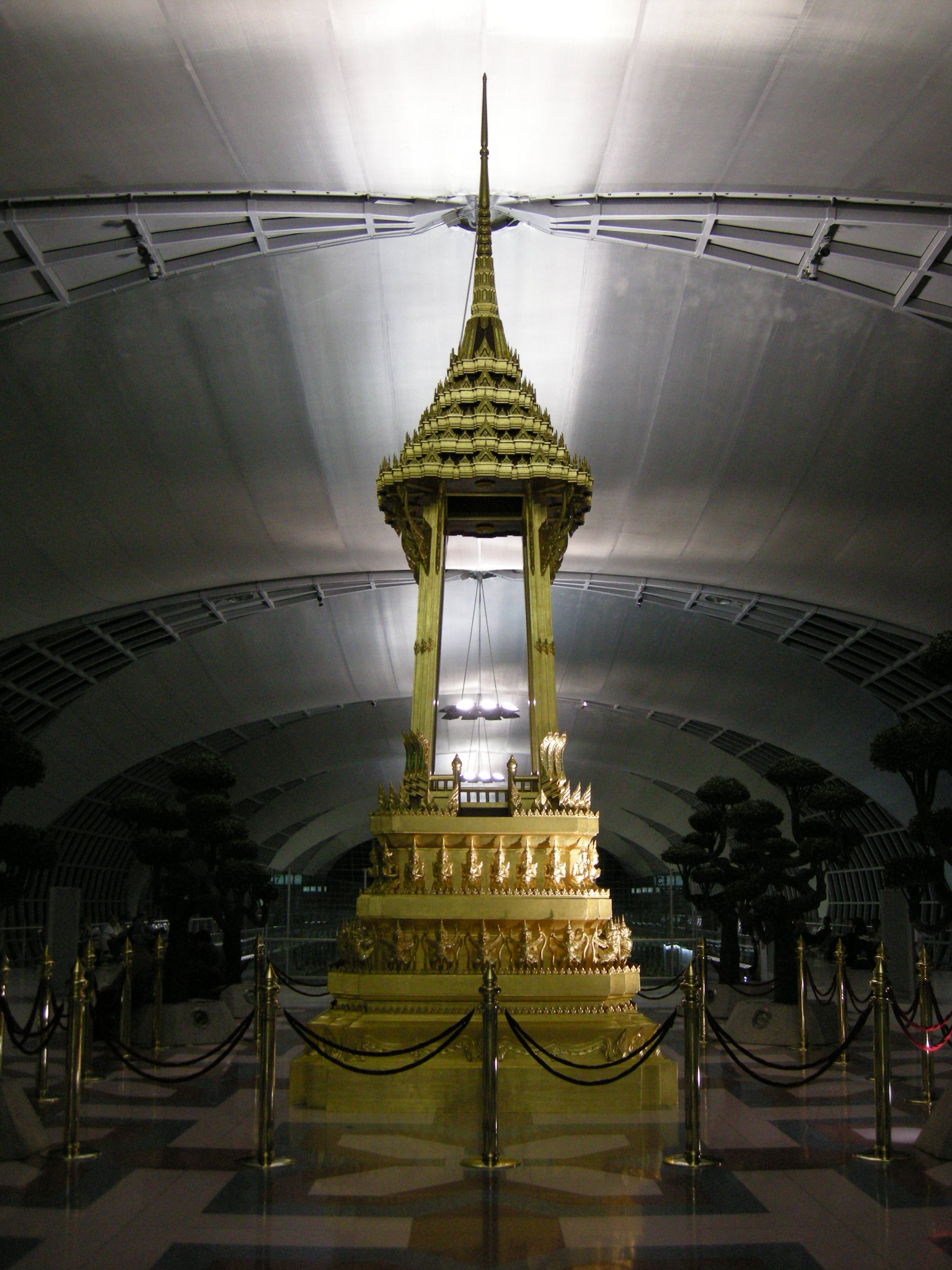 Bangkok Airport 13